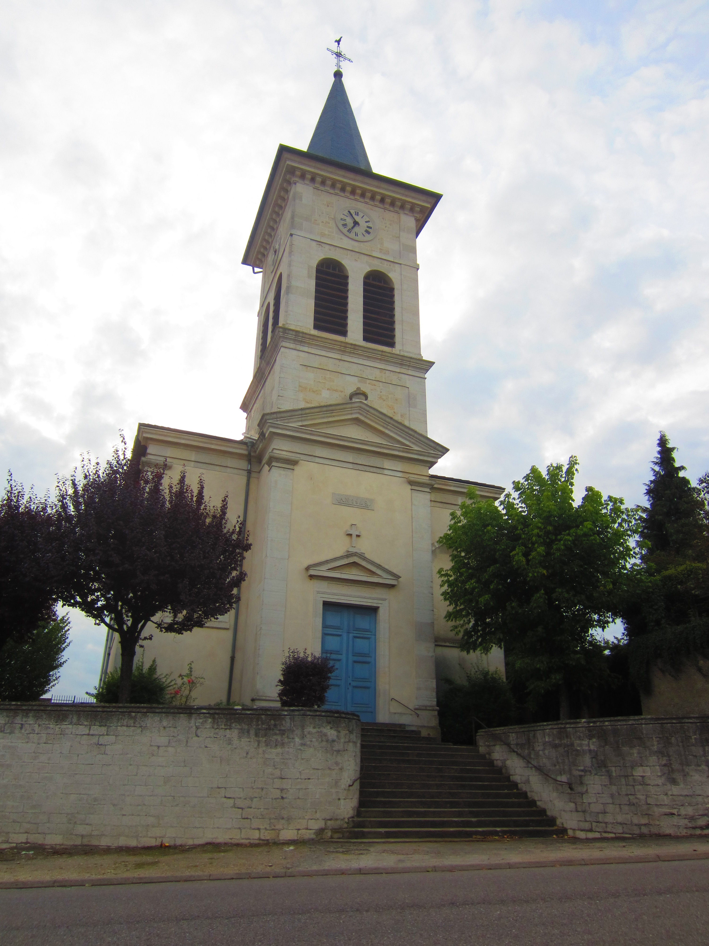 Eglise Menil tour